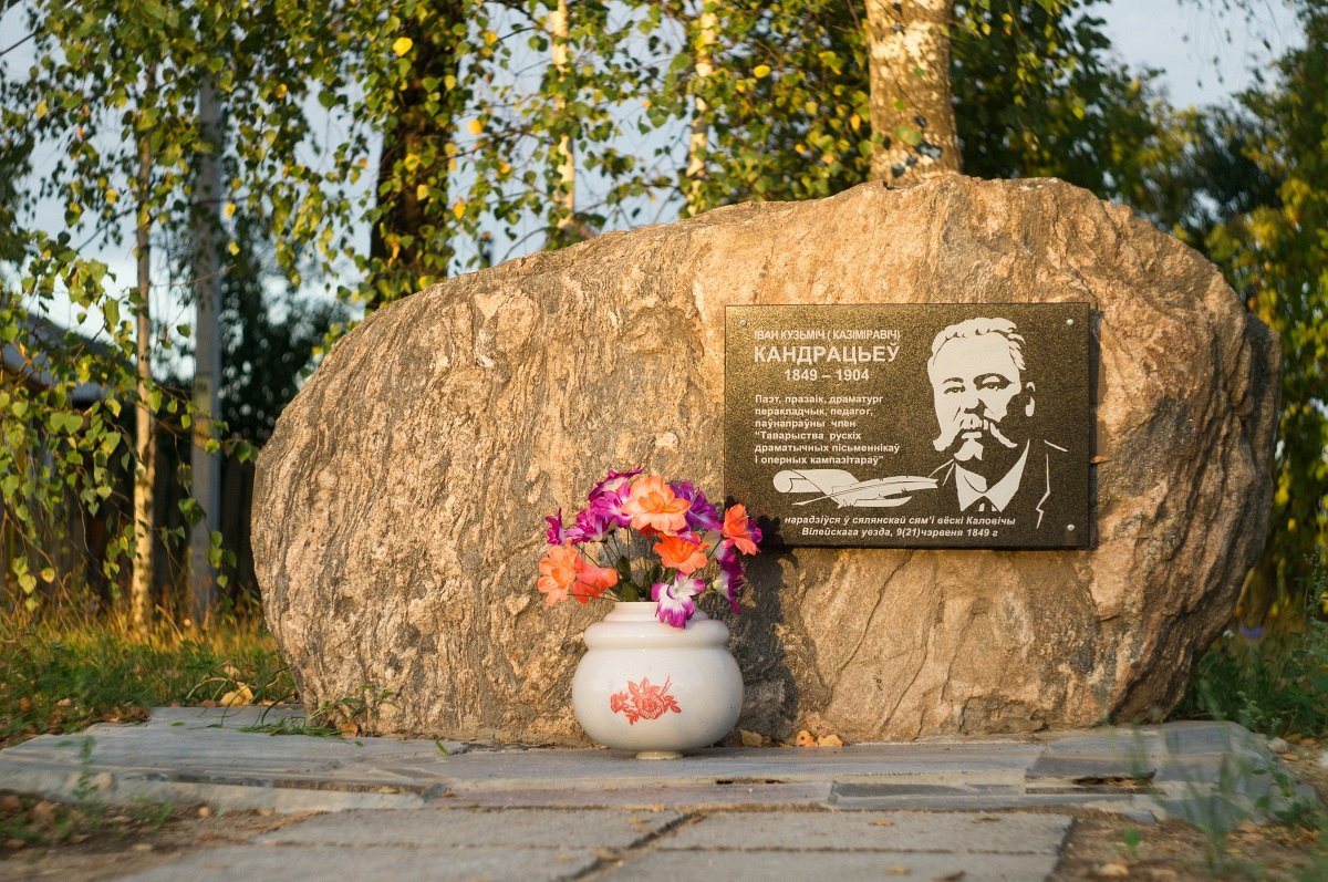 Каловічы. Мемарыяльная пліта Кандрацьеву